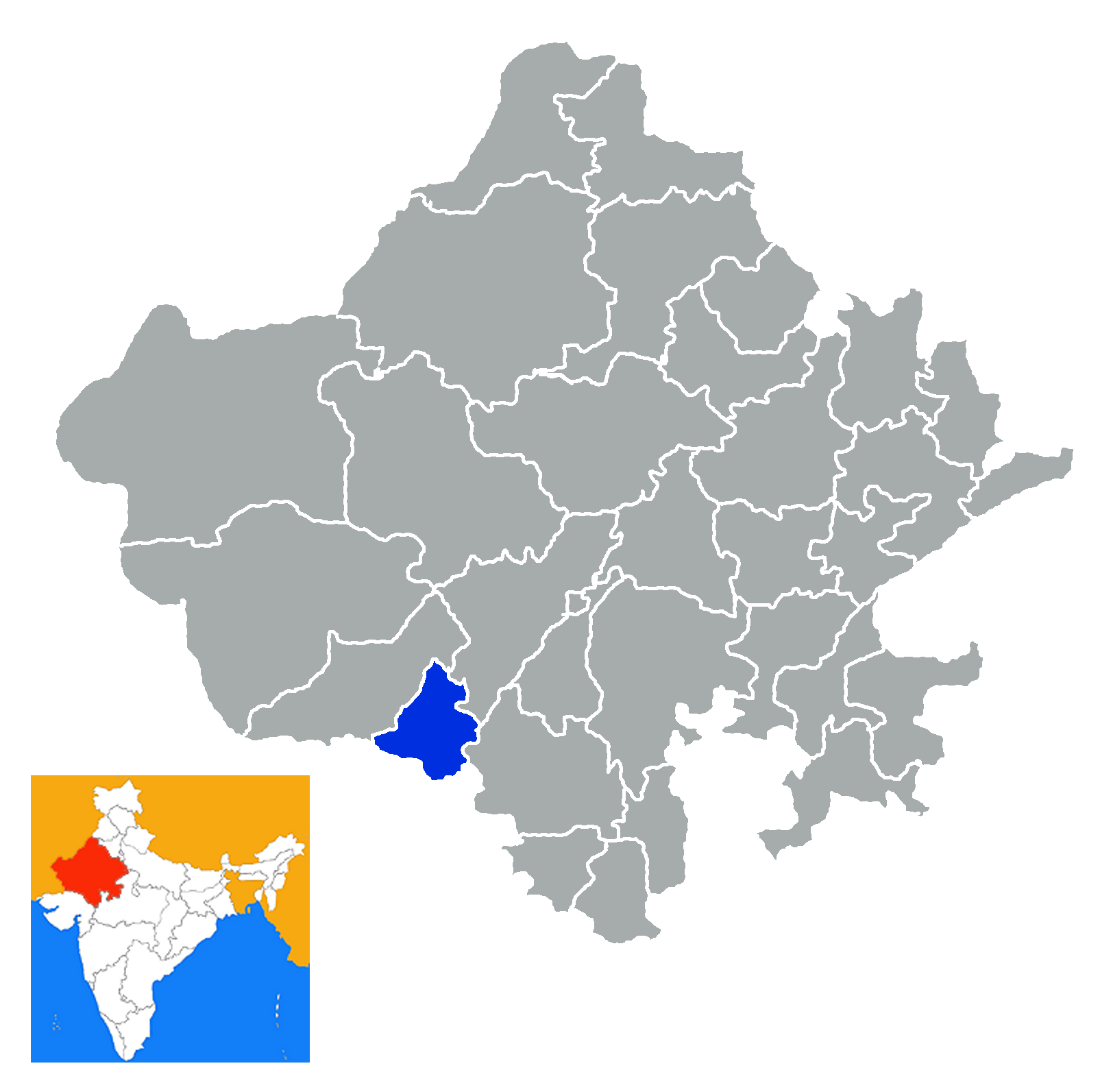 Distrito de Sirohi Rajastan India